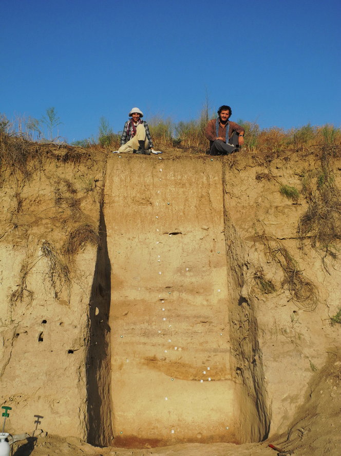 Uzun Oba yaşayış yeri